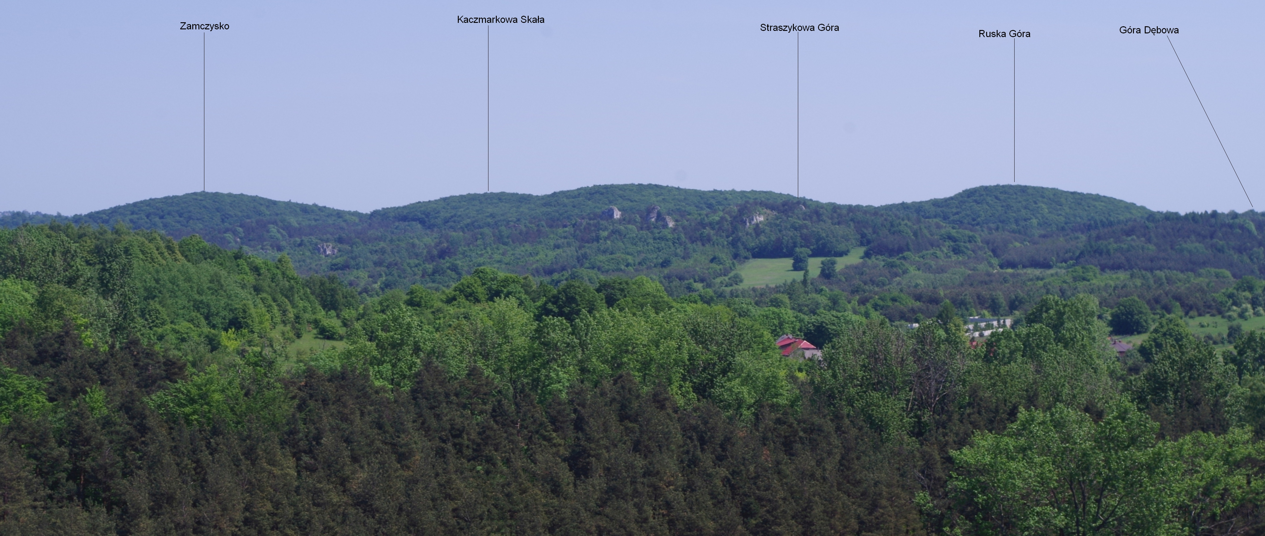 Widok ze szczytu Wielkiego Grochowca